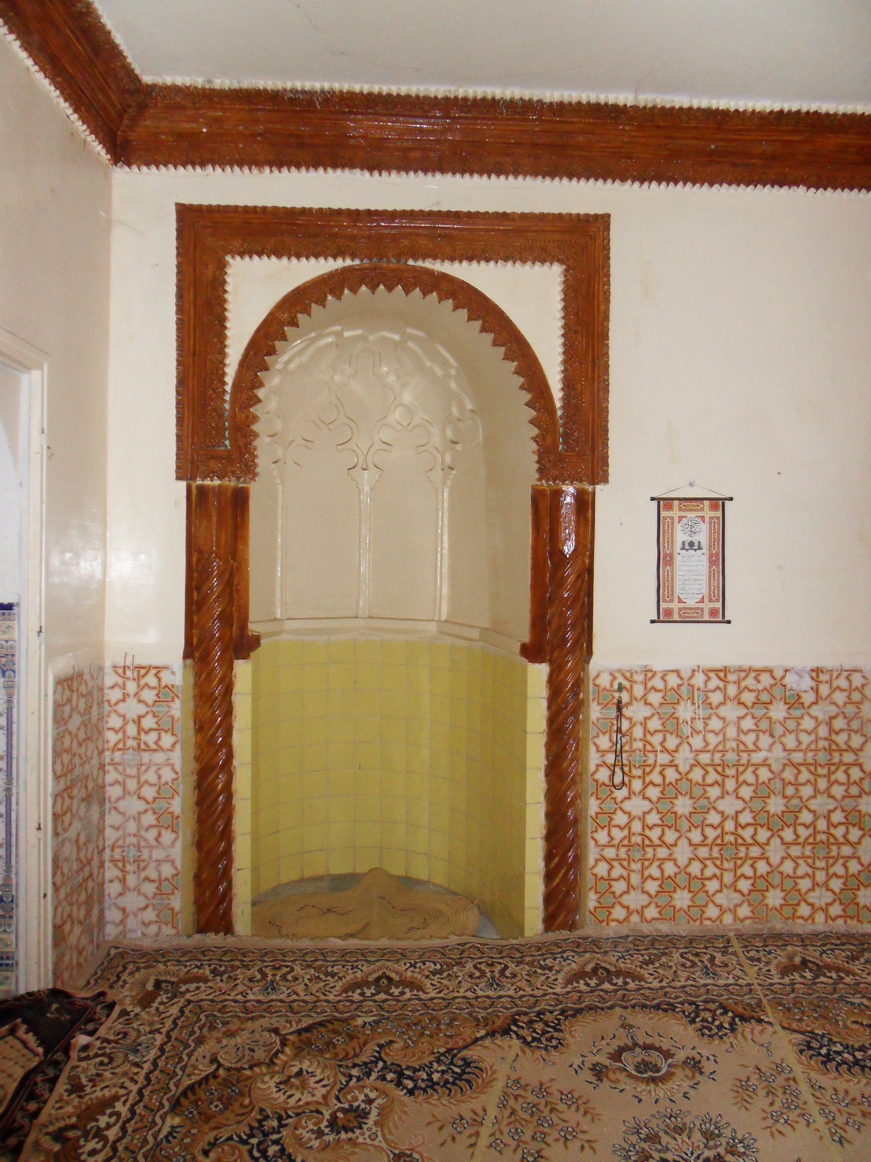 Mihrab de la mosquée Ibn Toumert, à Oued Ghir — XIe/XIIe siècle